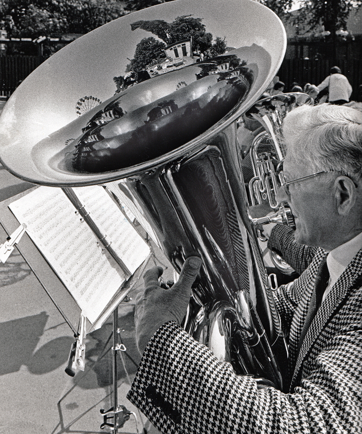 En musiker spelar på sin Bastuba i Folkets Park Malmö 1987.